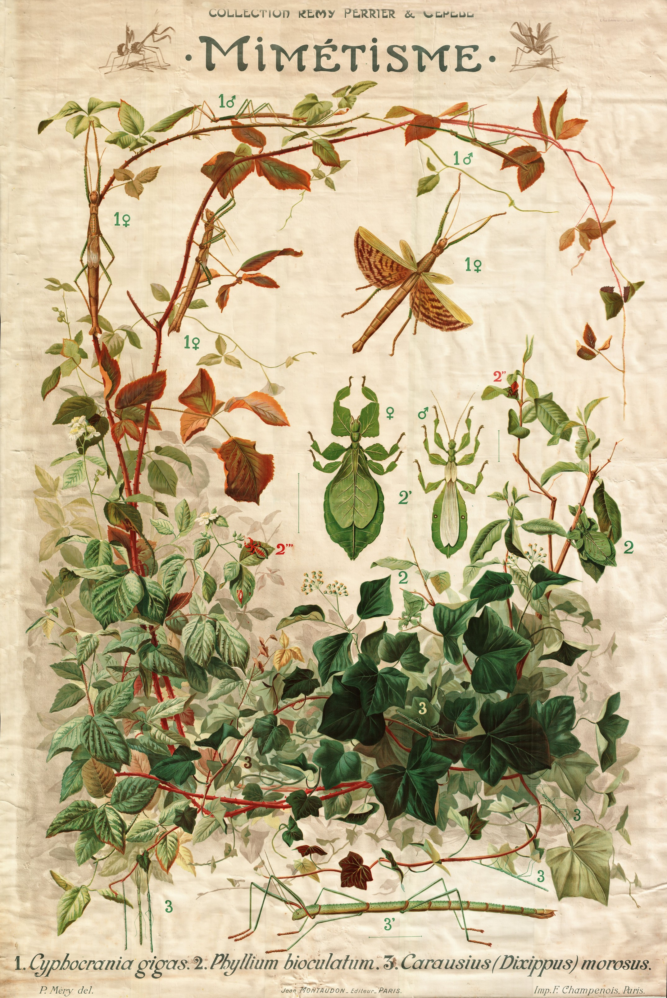 Mimétisme. Bibliothèque Numérique de l'Université d'Artois. Retrieved on 27 March 2016.